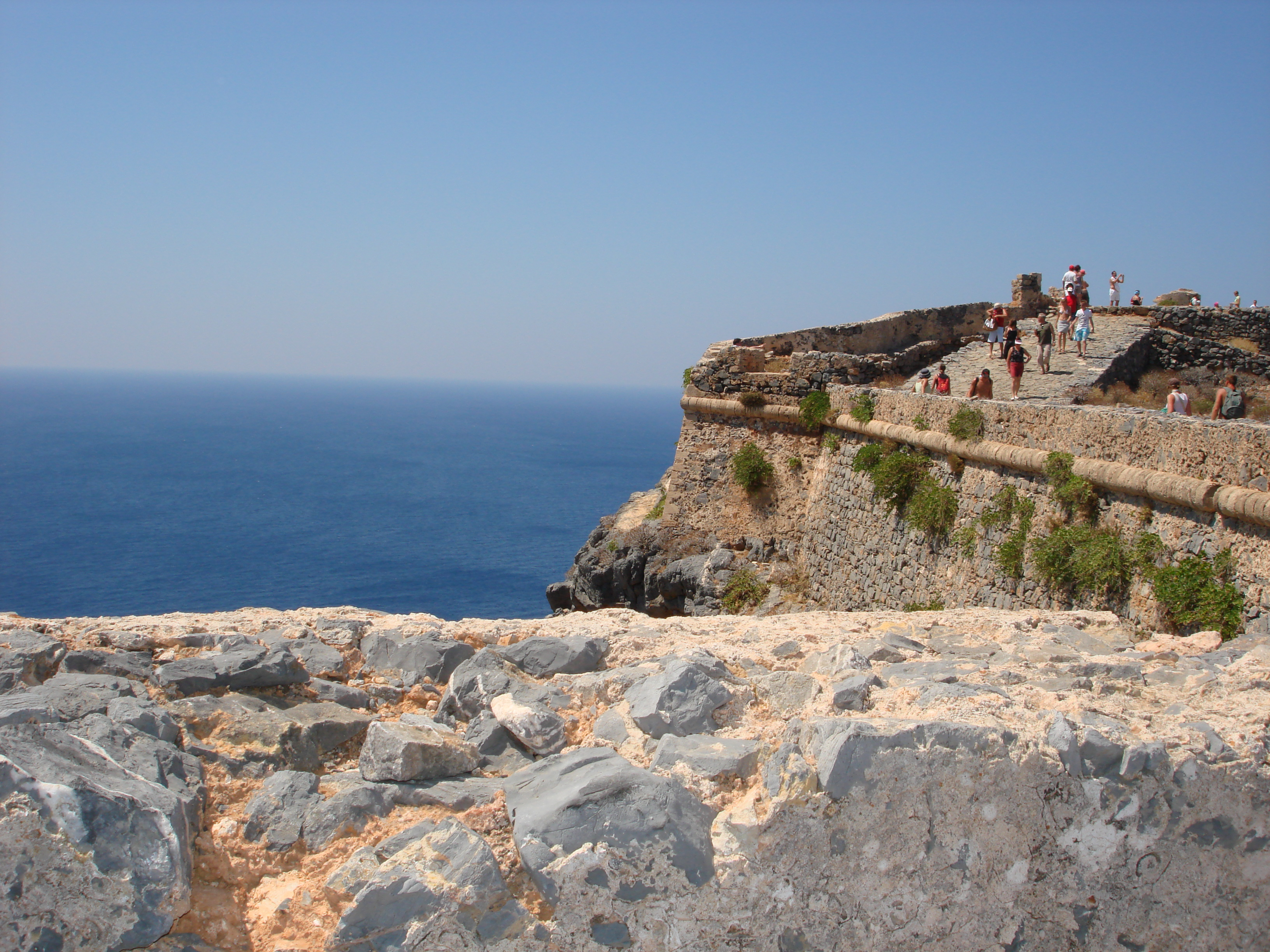 zelfgemaakte foto van het Venetiaanse fort op Gramvoussa, met zich op de zee.